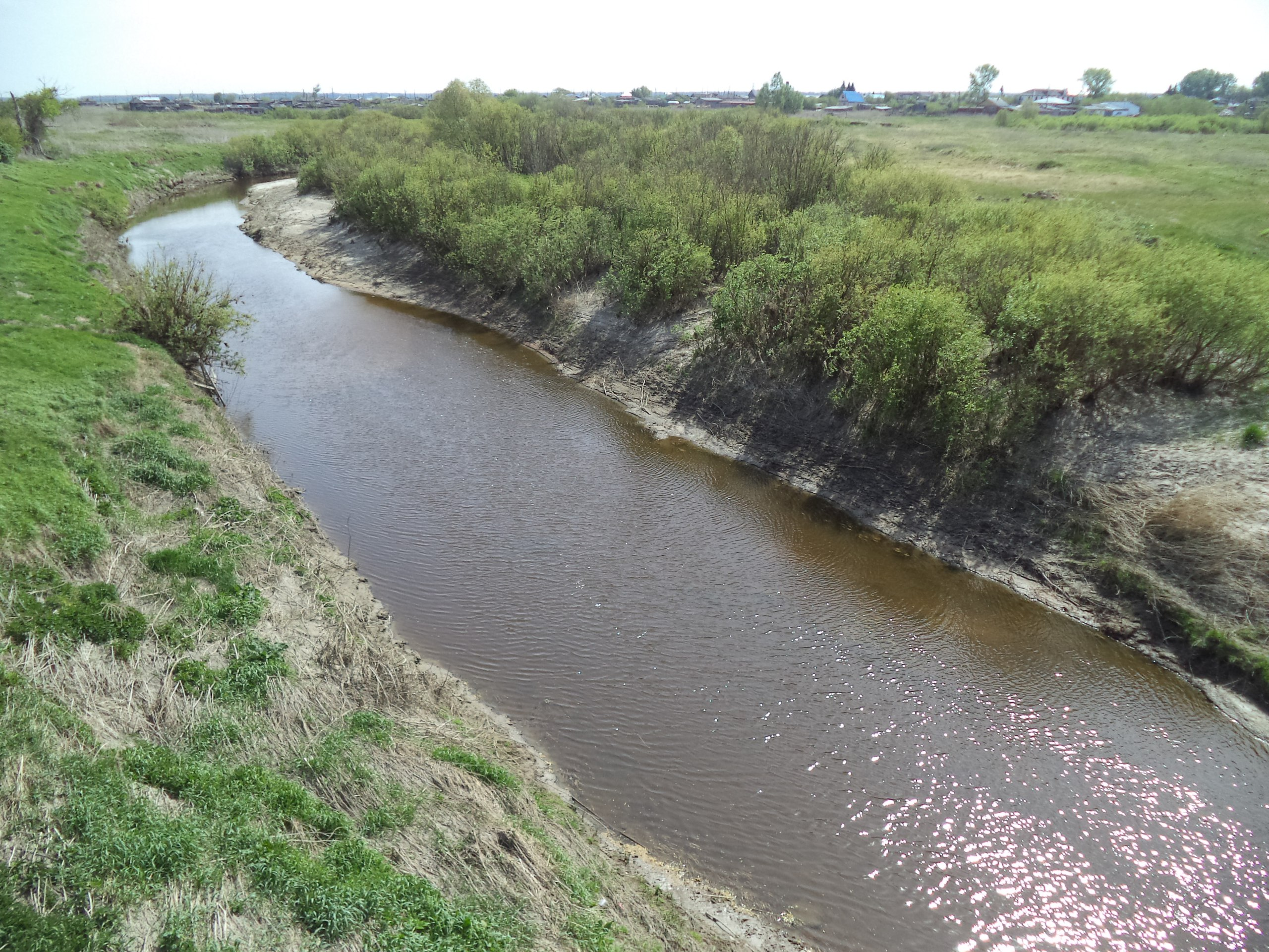 Село Верхнесуерская, Курганская область